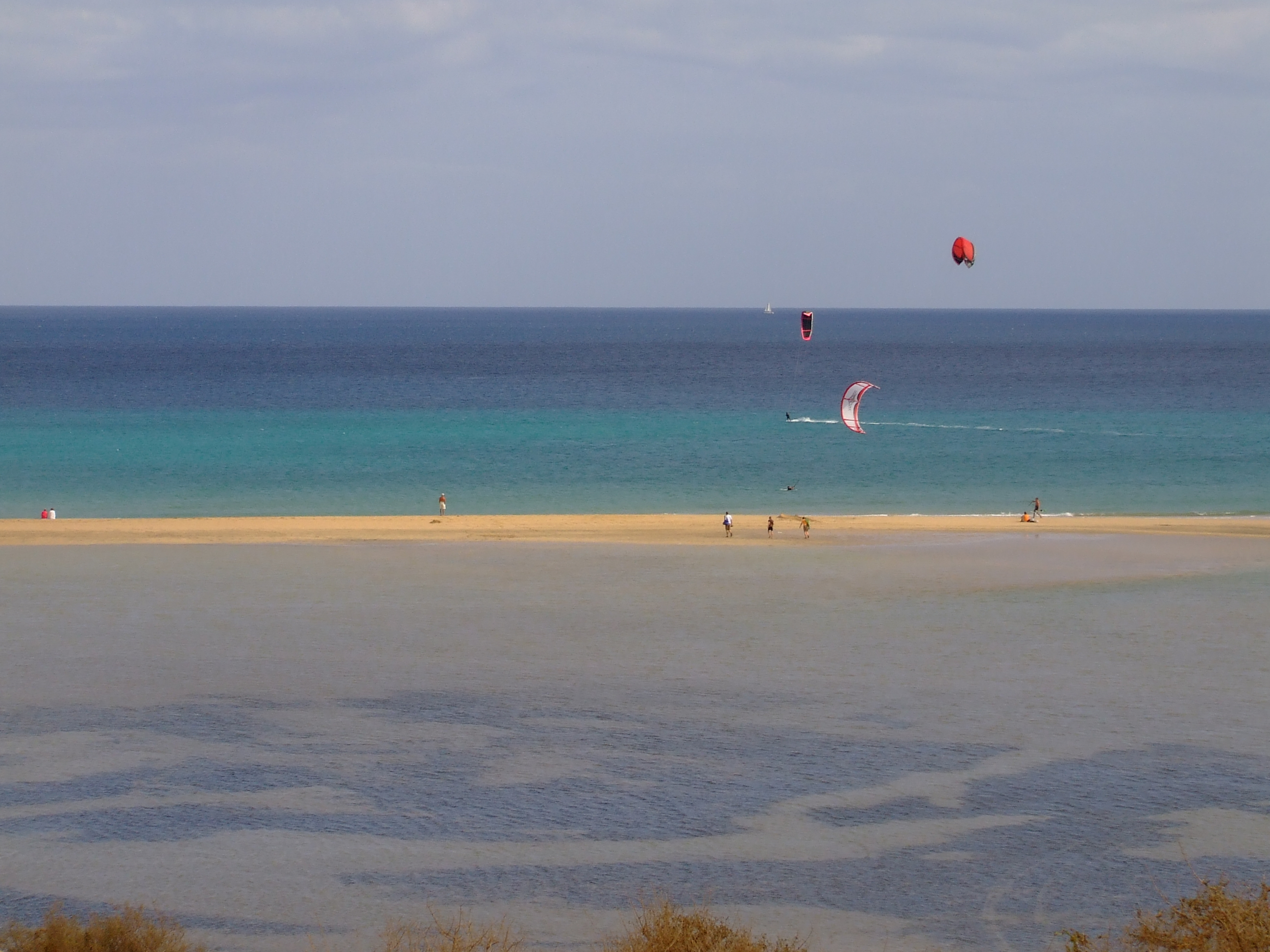 Playa Sotavento